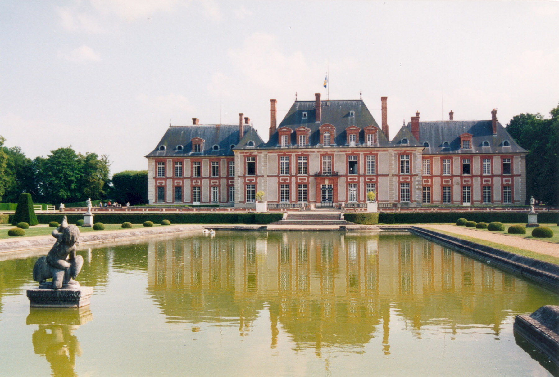 Le château de Breteuil coté parc Auteur : GIRAUD Patrick Licensing Breteuil Catégorie:Image de Choisel